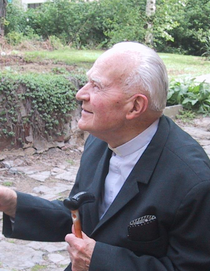 Pater František Kohlíček v době svých 90. narozenin